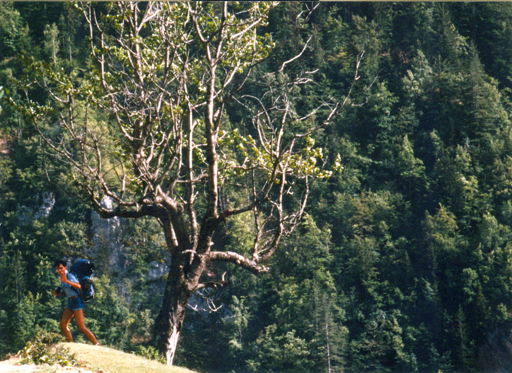 Pozdrav s fotografskim aparatom u ruci na Prokletijama.